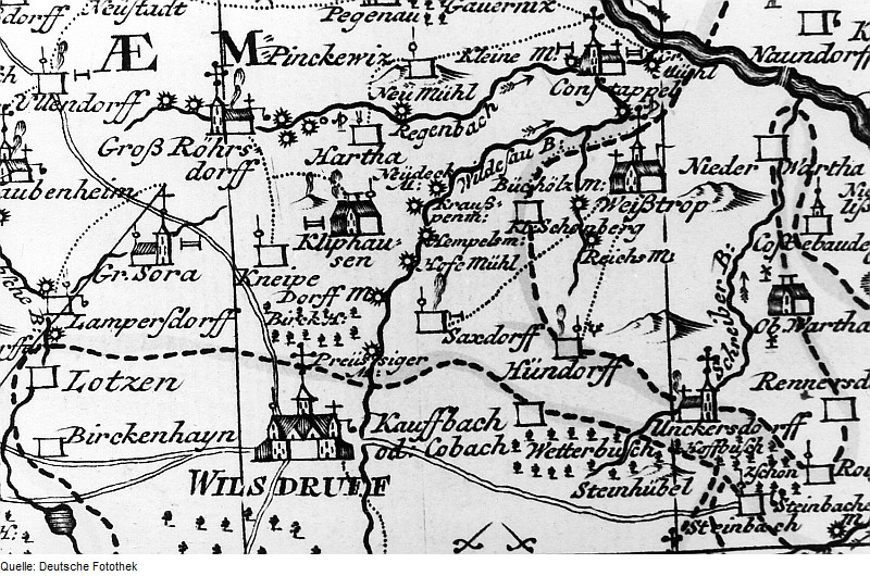 Original image description from the Deutsche Fotothek Klipphausen. Karte des Amtes Meißen, von Schenk, 1750 (Sign.: VII 104)